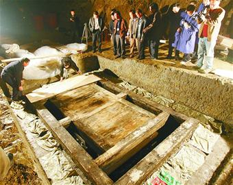 古墓